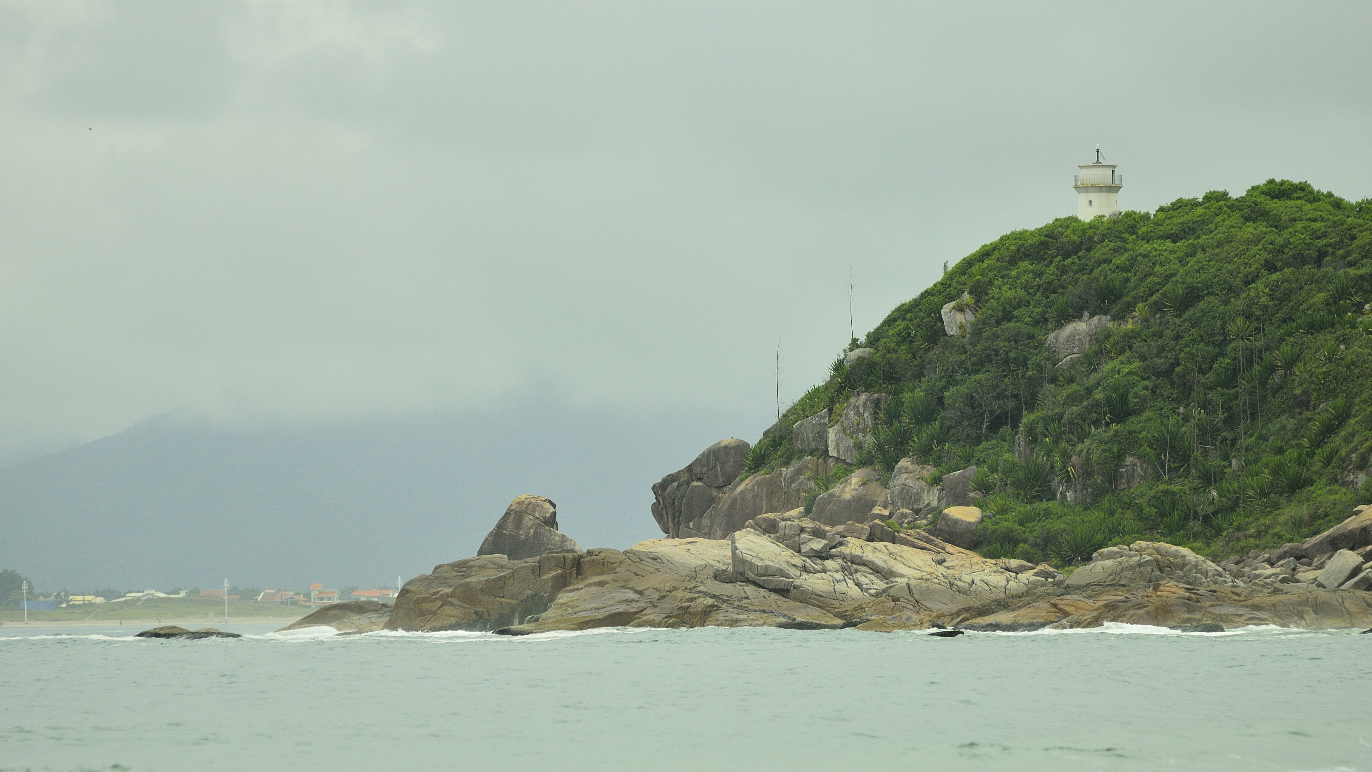 Praia dos Naufragados, Florianopolis, SC, Brasil.